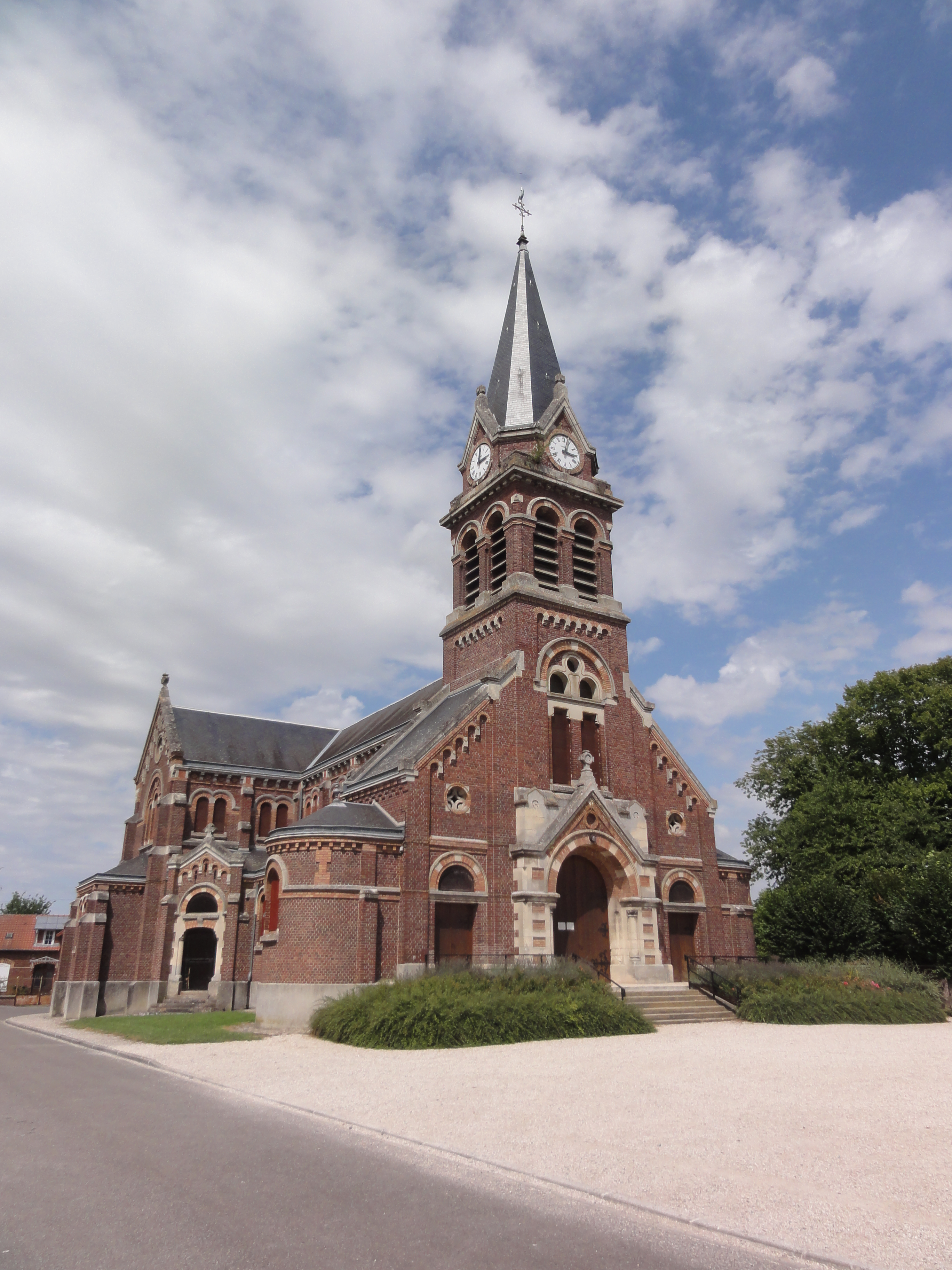 Flavy-le-Martel (Aisne) église Saint-Rémi